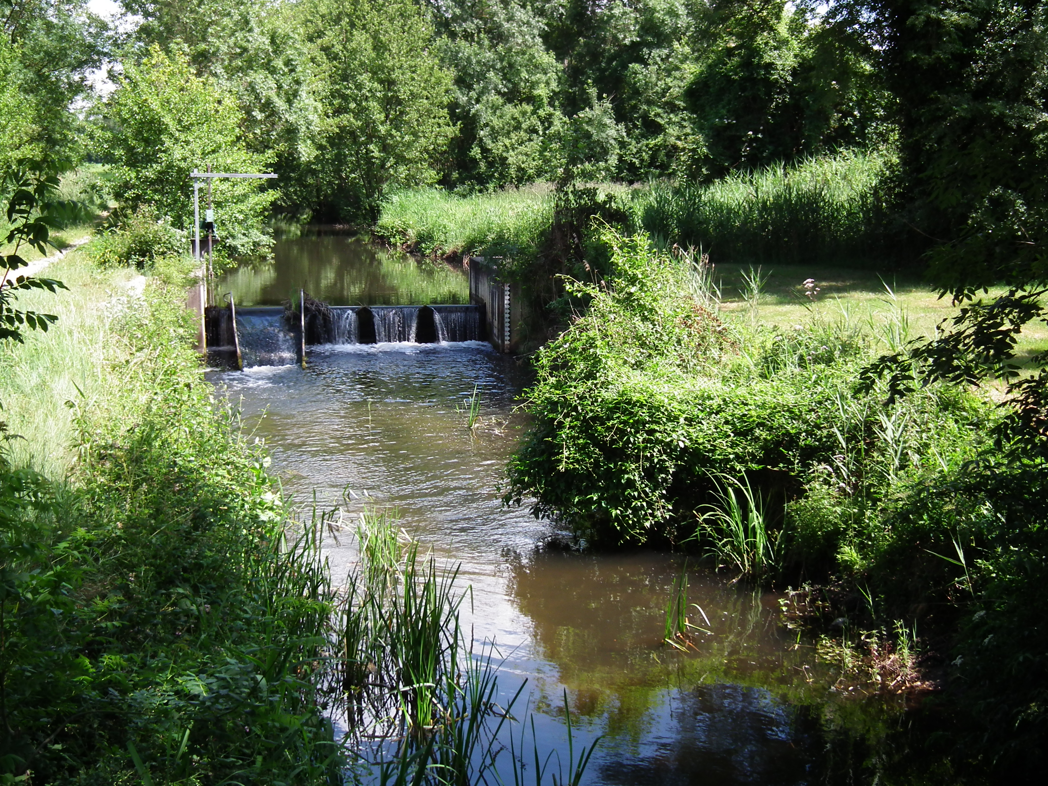 Le ruisseau des Epeaux, à Meursac